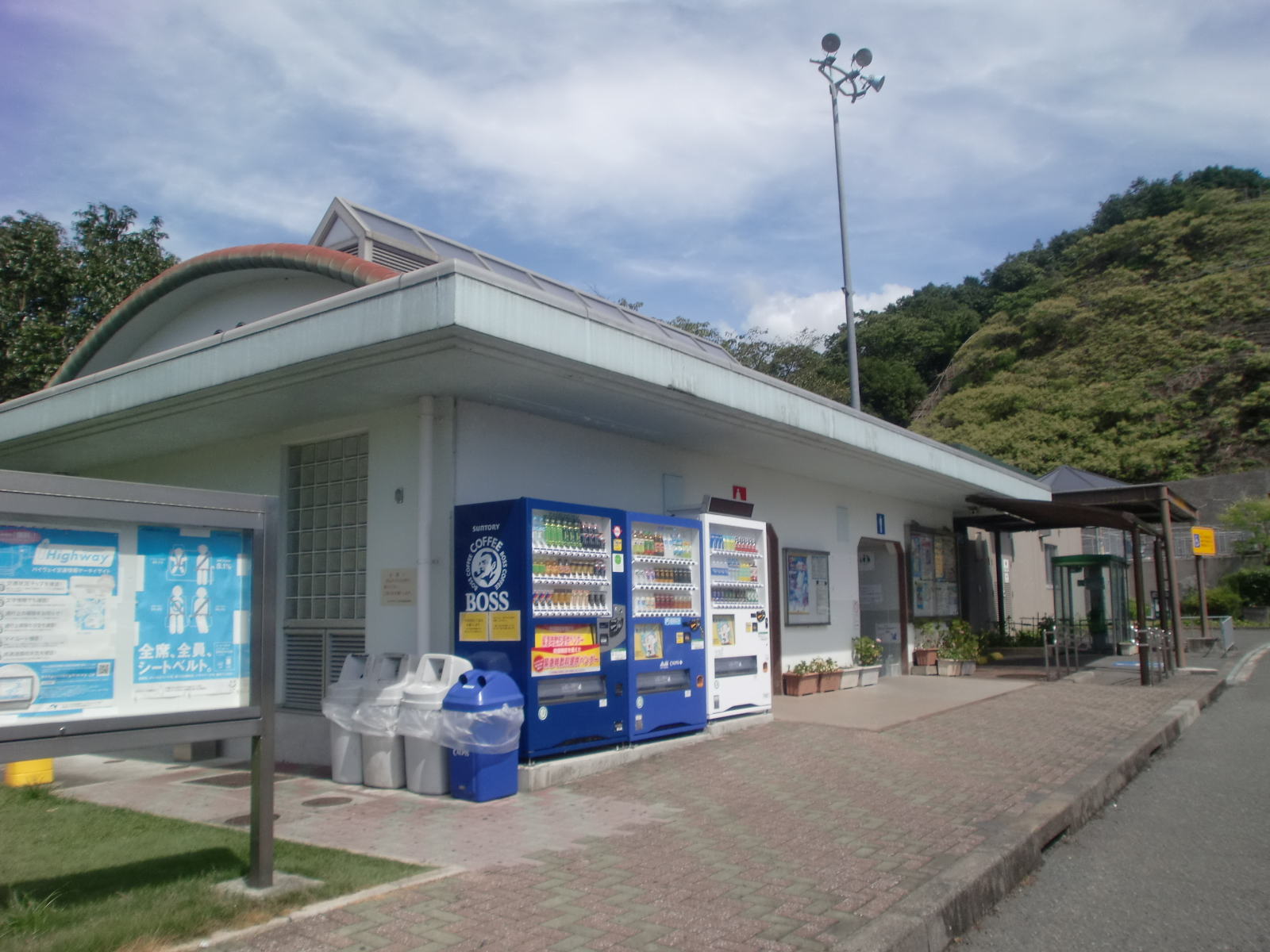 坂本パーキングエリア下り線の外観。